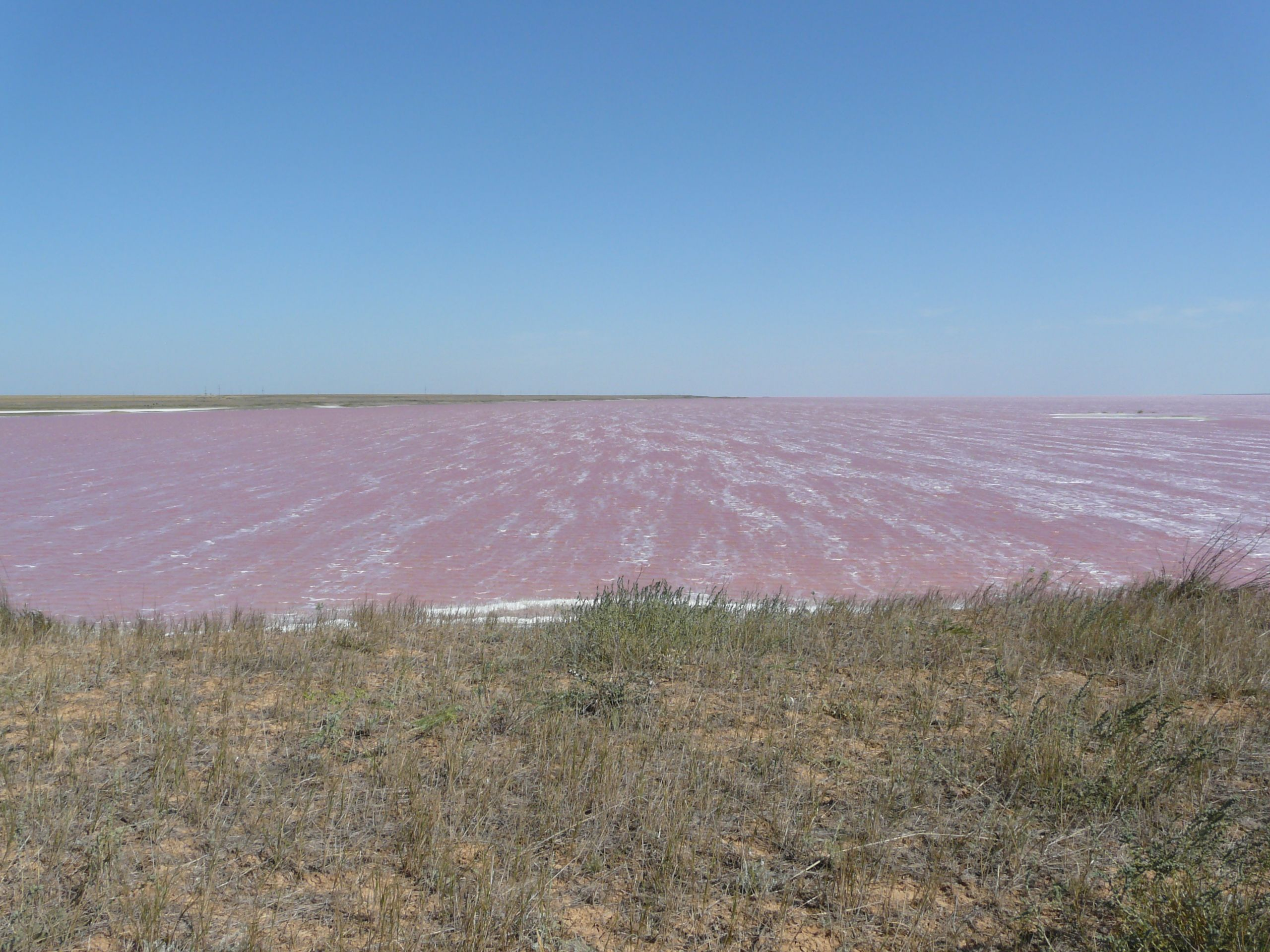 Das Wasser im westlichen Teil des Salzsees Siwasch (engl. Sivash) hat eine sehr hohe Salzkonzentration. Die rosa Farbe kommt wegen der Mikroalge Dulnaliella Salina, die viel Beta-Carotin produziert. Weitere Infos